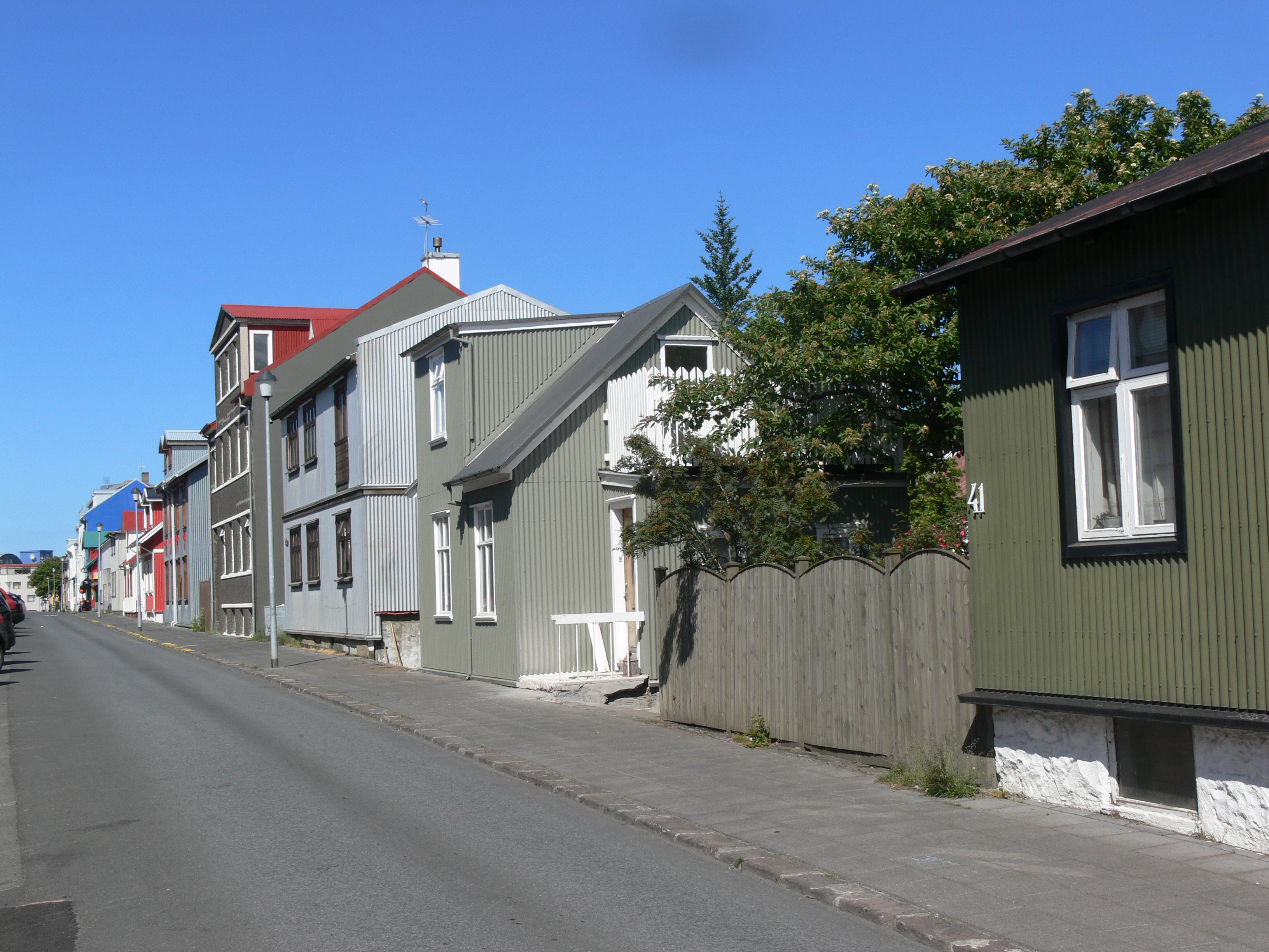 Njálsgata in Reykjavík.